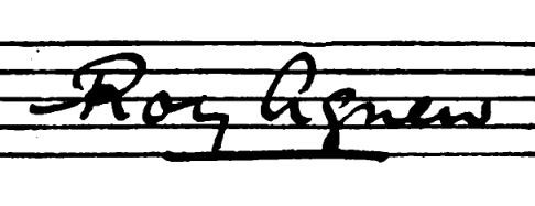 Signature de Roy Agnew.